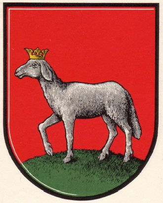 Kobel und Pirchegger